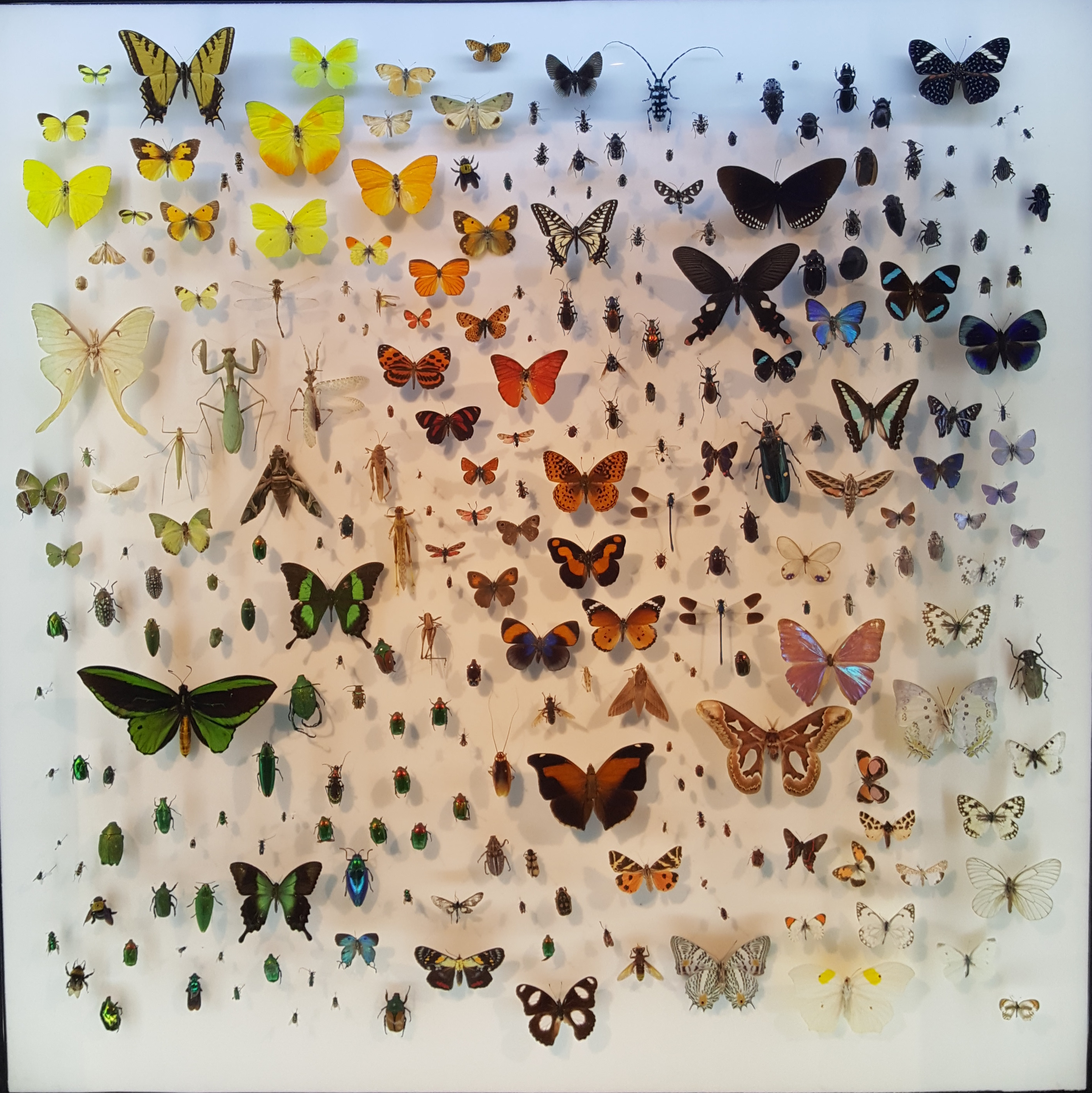 מוזיאון הטבע ע"ש שטיינהרדט, המרכז הלאומי לחקר המגוון הביולוגי, הוא מוזיאון ישראלי להיסטוריה של הטבע. המוזיאון, המוקם במסגרת אוניברסיטת תל אביב, עתיד להיות המוקד הגדול והפעיל ביותר של תיעוד ומדע בתחומי המגוון הביולוגי בישראל, וככזה תומך בפעילות ההגנה על הסביבה והחקלאות באזור.